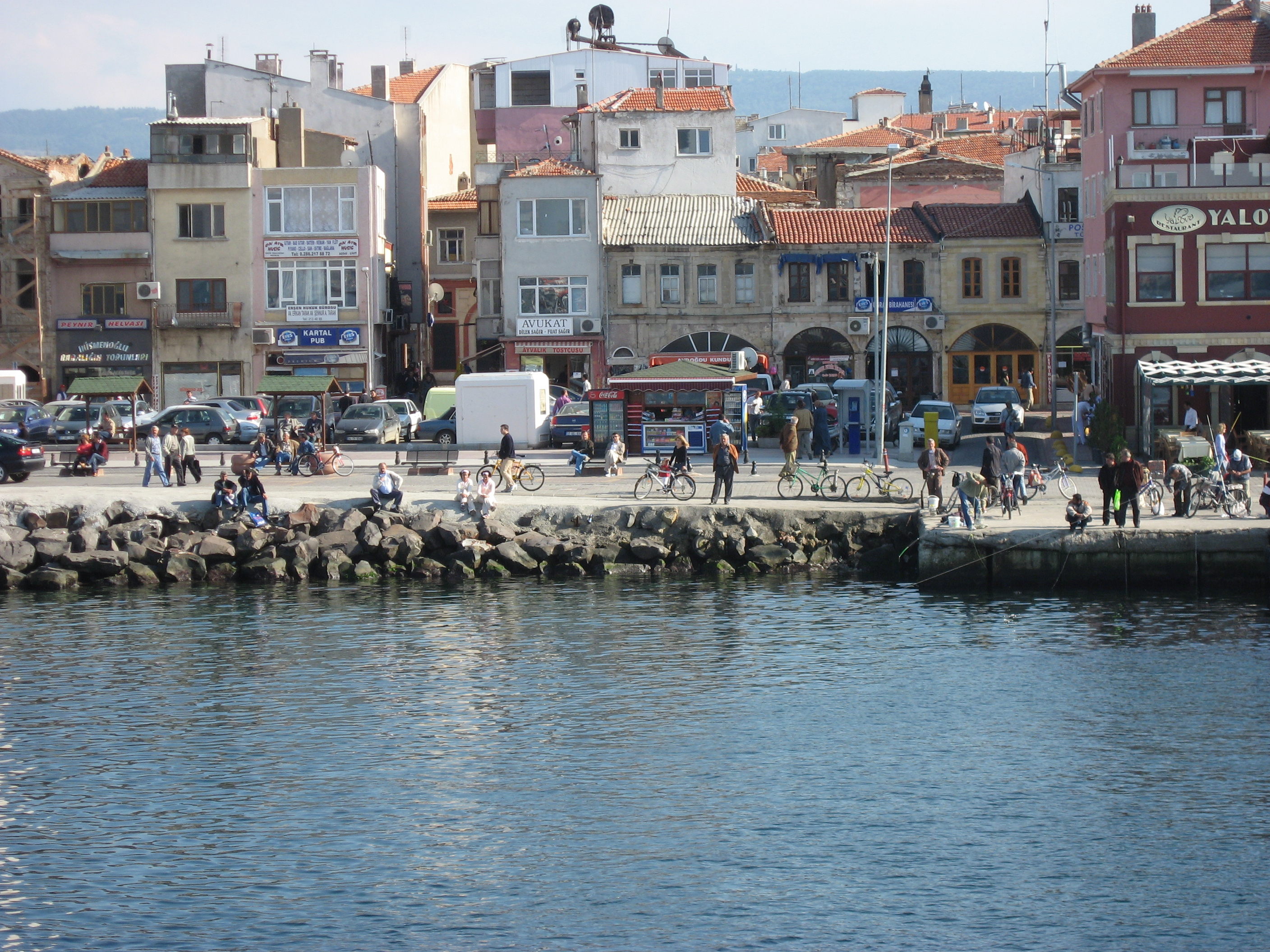 çanakkale eceabat